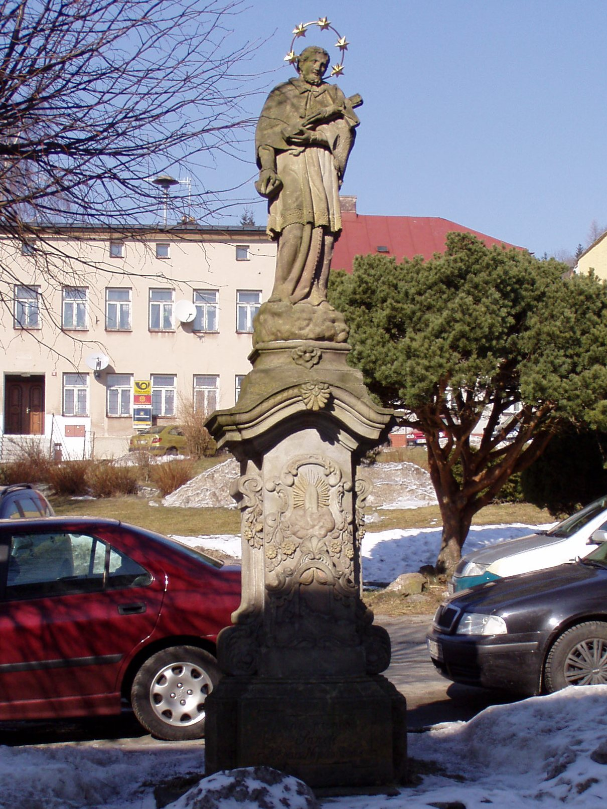 Olešnice v Orl. horách - socha